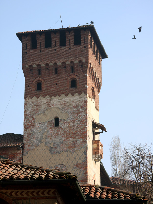 La torre del castello di Robbio (PV)